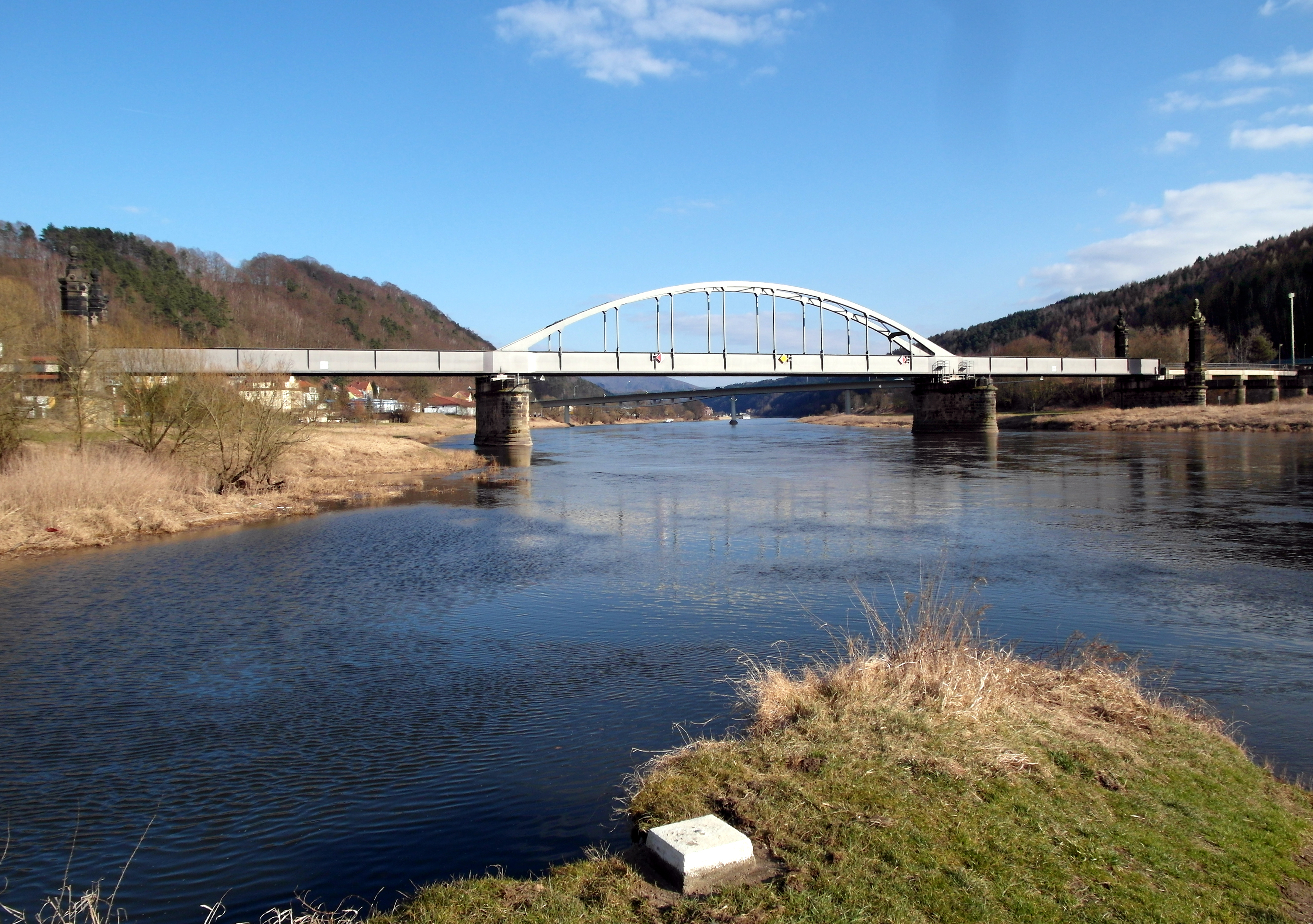 15.03.2018 01814 Bad Schandau: Carolabrücke (GMP: 50.923171,14.131507): Eine im Zuge des Baus der Bahnstrecke Bautzen-Bad Schandau von 1874-1877 erbaute, 187 m lange Eisenbahnbrücke, die zwischen Bad Schandau (Gemarkung Krippen) und Rathmannsdorf (Ortsteil Wendischfähre) die Elbe überspannt. Ursprünglich zwei Überbauten, einem für den Eisenbahnverkehr und einem parallel angeordneten für den Straßenverkehr. 1985 die Demontage der alten Straßenbrücke und anschließend der Austausch der Überbauten der Eisenbahnbrücke. Oktober 1990 waren die Baumaßnahmen abgeschlossen. Die Schifffahrtsöffnung von 83,2 m im mittleren Feld ist eine stählerne Stabbogenbrücke. Im Durchblick sieht man stromaufwärts die 1977 erbaute neue Stahlbeton- Straßenbrücke. Sicht von Westen. [SAM4683.JPG]20180315305DR.JPG(c)Blobelt